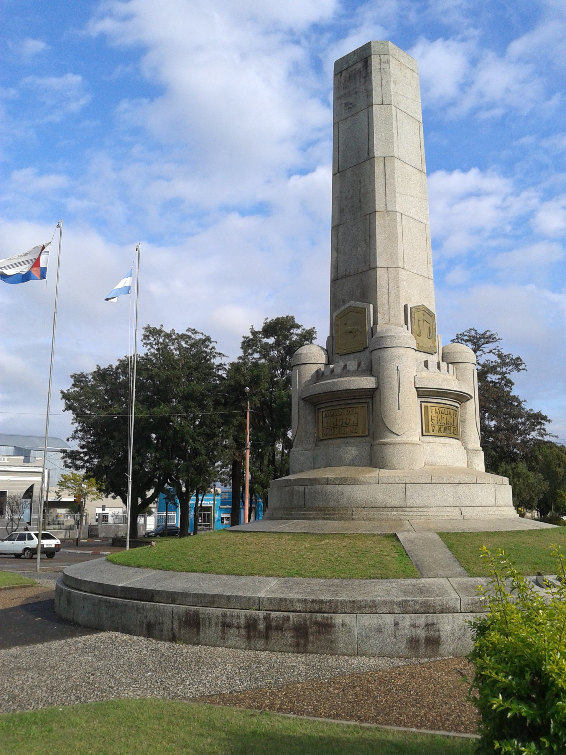 Obelisco a la Gloria de los Héroes de 1825. Ubicada en el departamento de Artigas